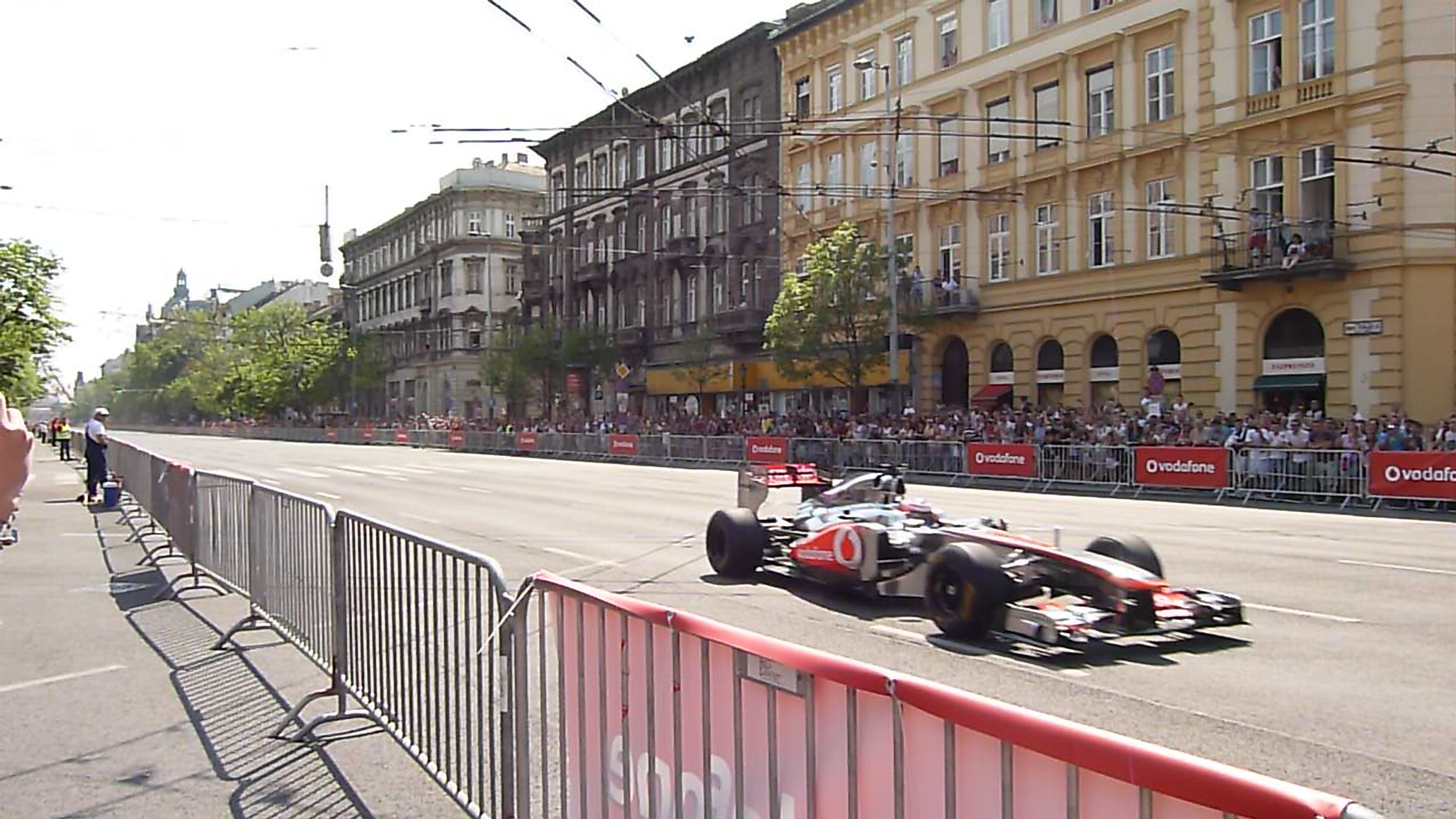 Jenson Button – Budapest Show 2012 1-43 live on the 29th of April, 2012. Budapest, Downtown. Boksz street. 44-58 live on the 1st of May, 2012. Formula 1 Show sponsored by Vodafone. 57, 58: First ever, Downtown, Budapest Jenson Buttons first two circles on the ring. (Bajcsy Zsilinszky boulevard). Published under Creative Commons int he Metapolisz DVD line. Button on Youtube: same titel. Jenson Button – Budapest Show 2012 (5). Jenson Button – Budapest Show 2012 (44-58) A felvételek 2012. május 1. –én kedden készültek Budapesten, a Belvárosban. A Bajcsy Zsilinszky út (Kálmán Imre vonalában). Jenson Button tartott bemutatót. 14 után, majd 15 és 16 óra után tett néhány tiszteletkört. A program ismertetése (951), interjú Buttonnnal (975) A Bajcsy Zsilinszky út (Kálmán Imre vonalában). Jenson Button tartott bemutatót. 14 után, majd 15 és 16 óra után tett néhány tiszteletkört. Jenson Button első és második köre Budapesten (981: 41 –nél és 2.15 –nél). A felvételek megjelentek Creative Commons alatt a Metapolisz DVD sorozatban. Jenson Button első körei a Belvárosban. Button a Youtube- on ugyanezen címmel. Jenson Button – Budapest Show 2012 (5).